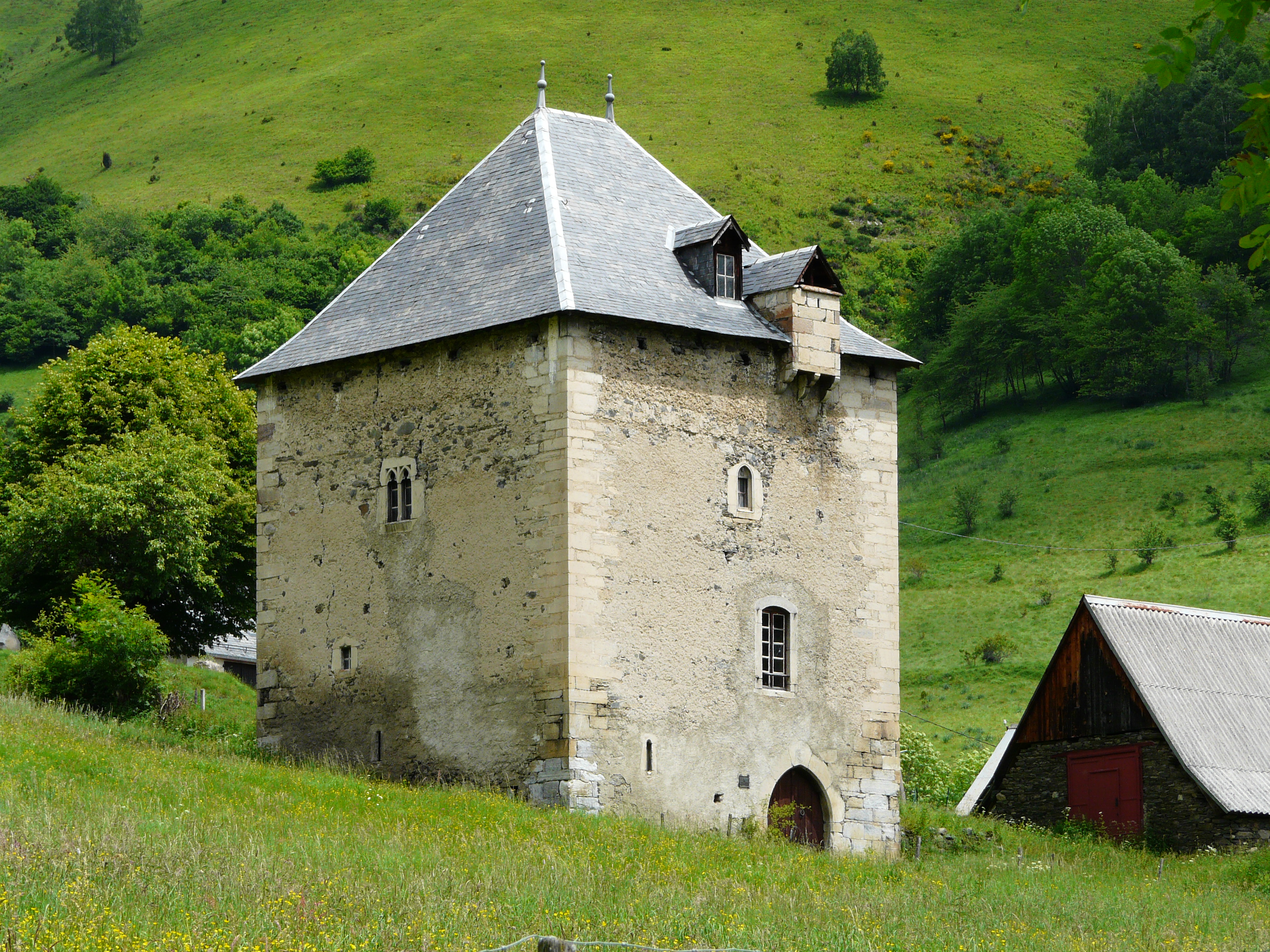 La tour de Mayrègne vue depuis le sud-ouest, Haute-Garonne, France.